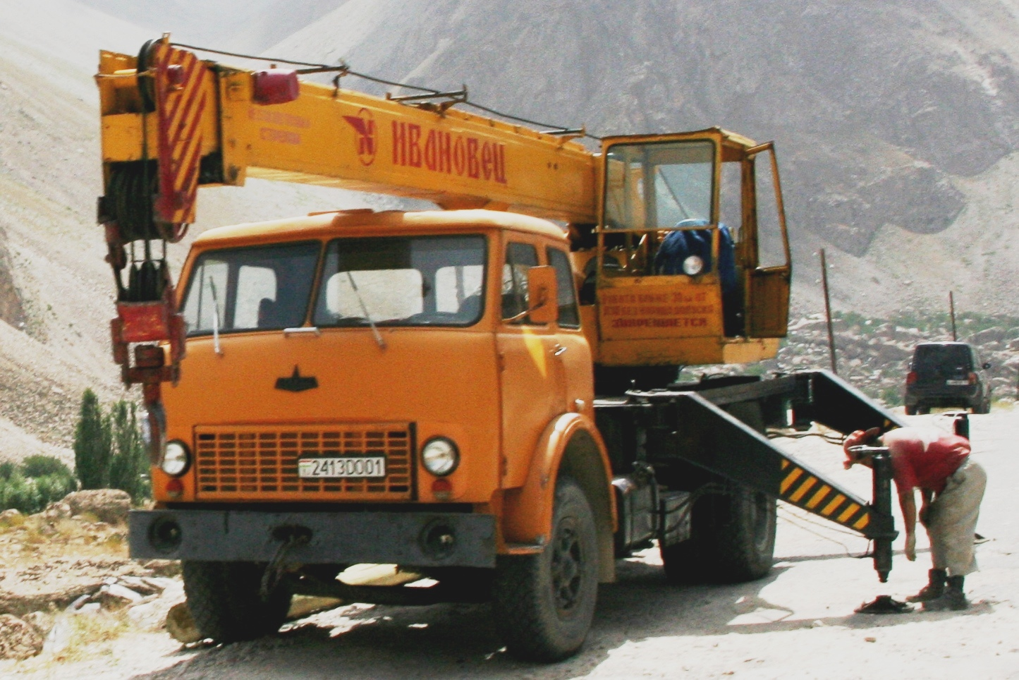 MAZ-500A-Kranwagen an der tadschikisch-afghanischen Grenze. Im Einsatz bei der Reparatur von Freileitungen.